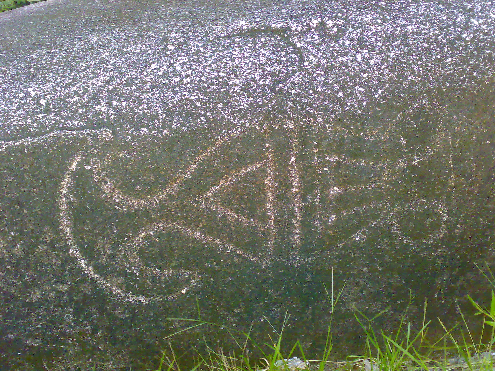 Petrogrifos en el Rio Inírida